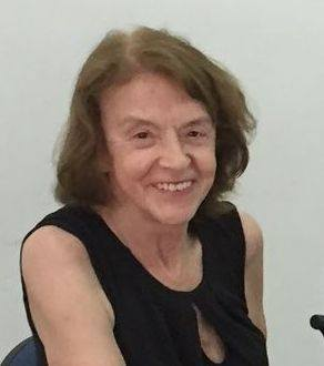 Alicia Beatriz Casullo, psicoanalista